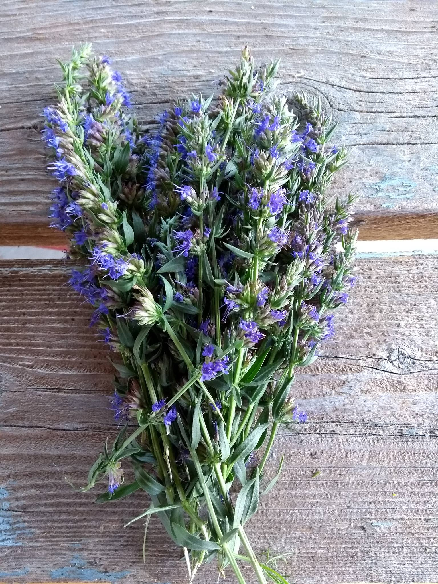 Bouquet d'hysope destiné à la cuisine